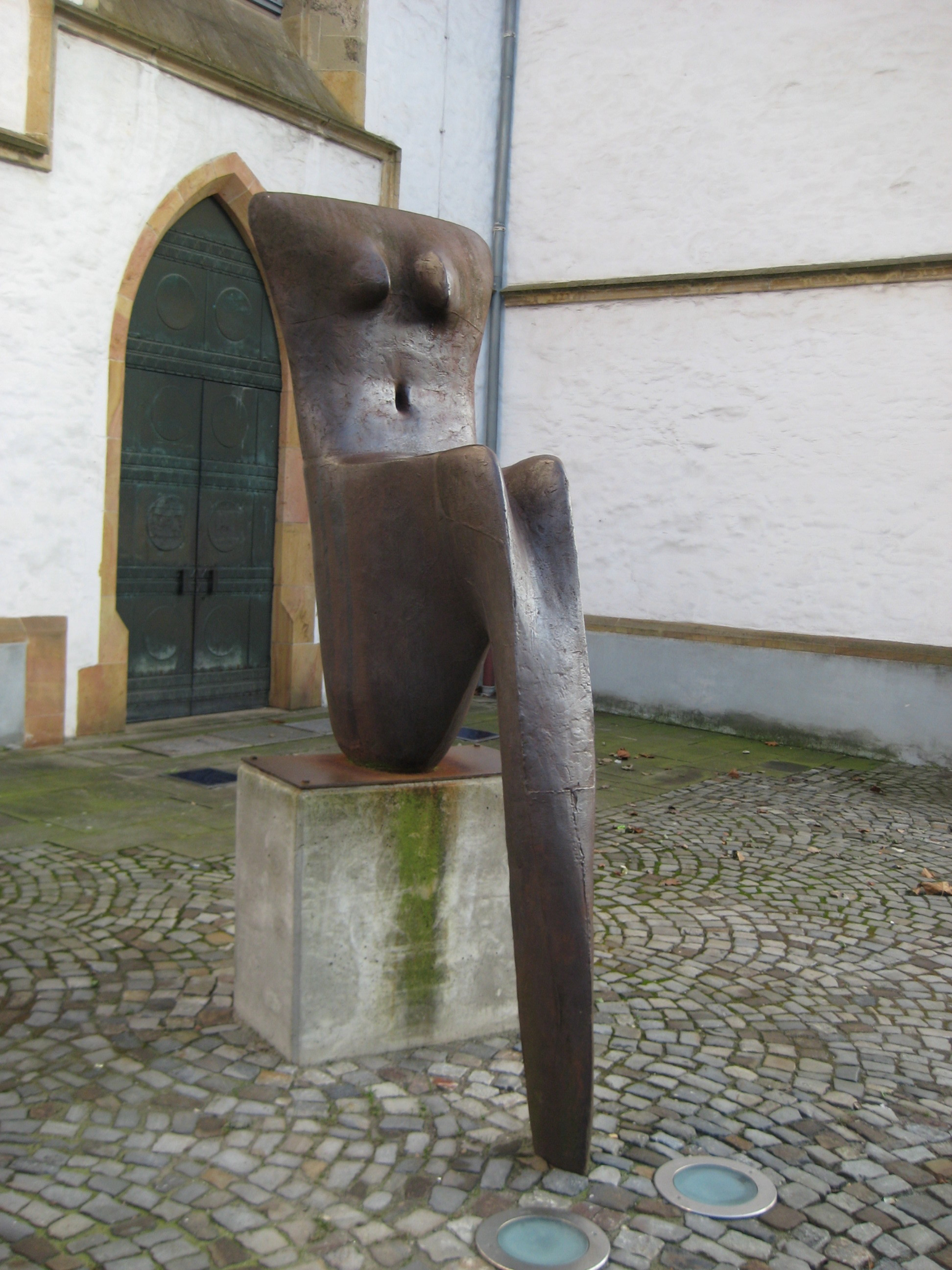 Lothar Fischer (Bildhauer) (1933-2004): Großer sitzender weiblicher Torso, Eisenguss, 1978-1986, an der Kunsthalle Dominikanerkirche in Osnabrück